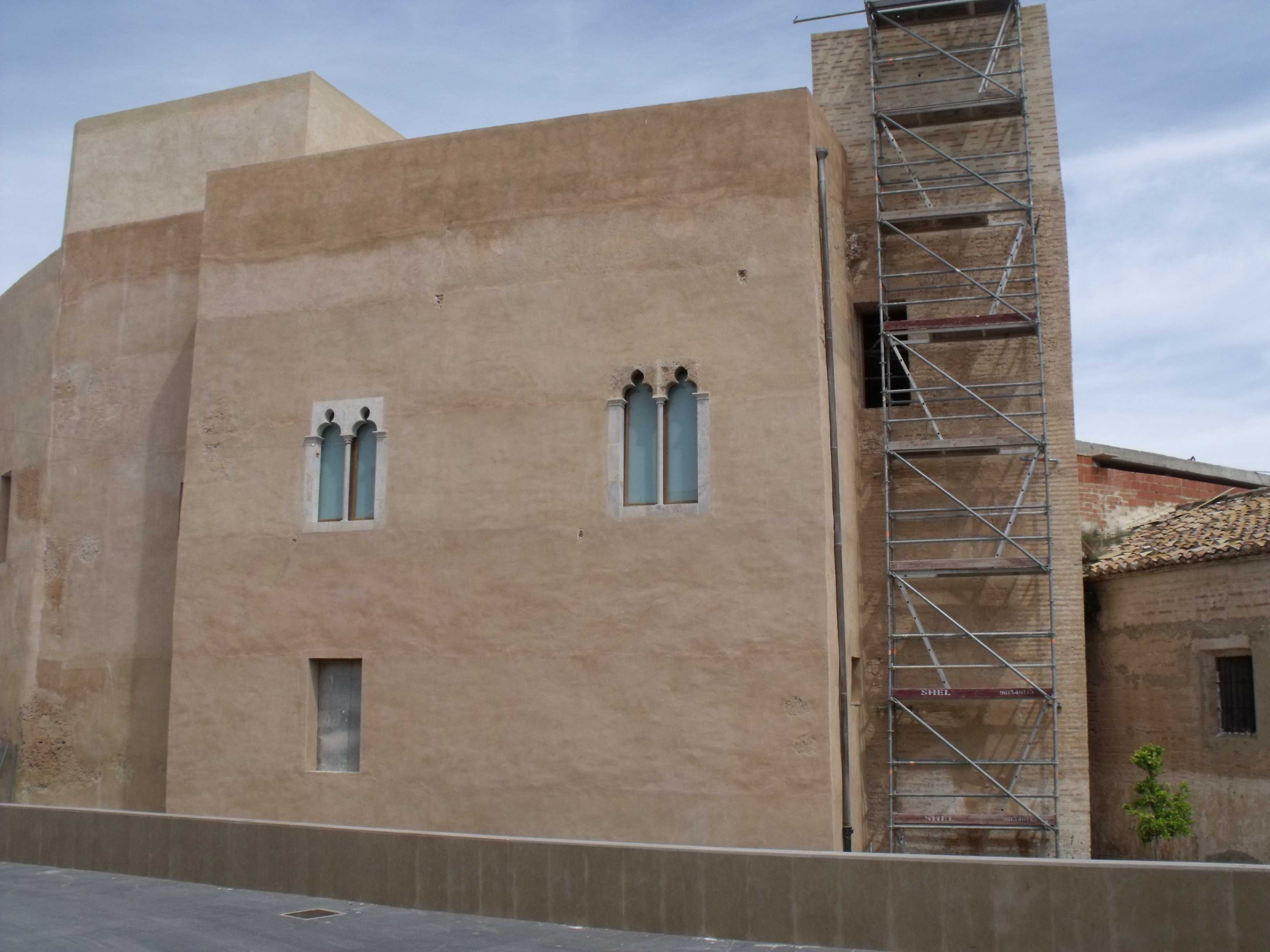 Castillo de Ribarroja del Turia.